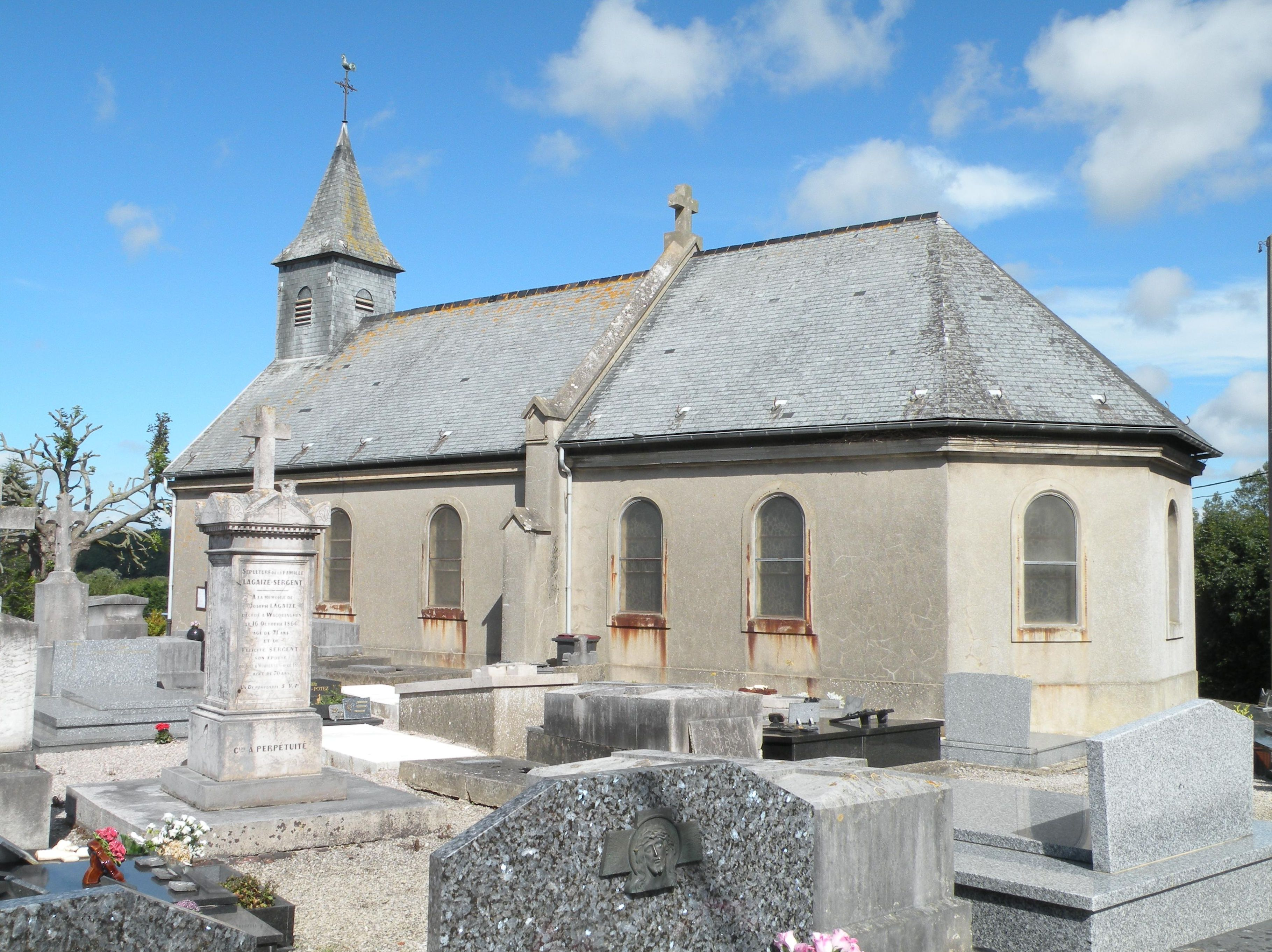 L'église de Wacquinghen.